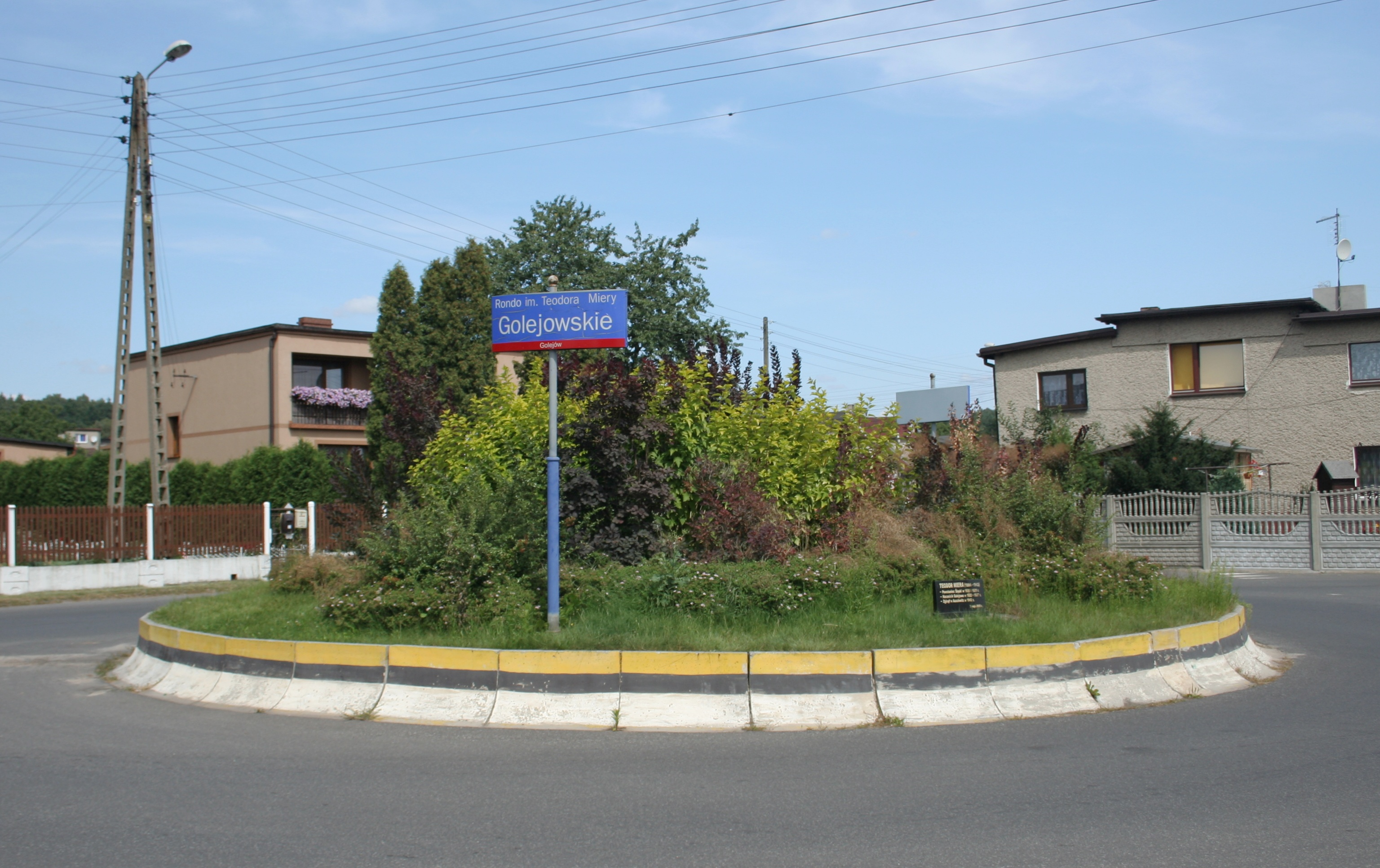 Kruhový objezd v Golejowě, součásti Rybniku, Dolnoslezské vojvodství, Polsko